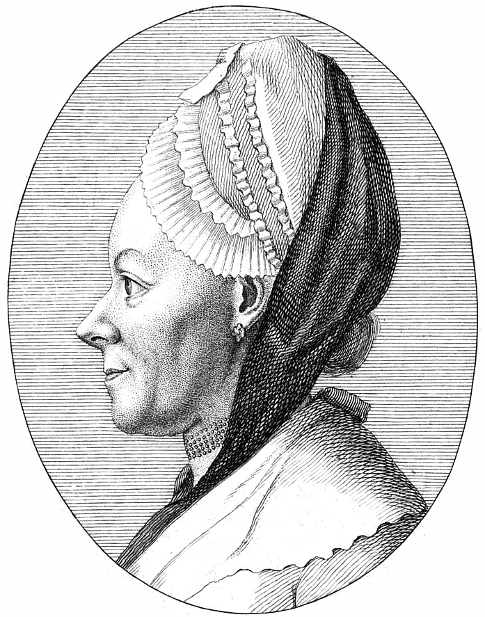 Anonyme Druckgraphik